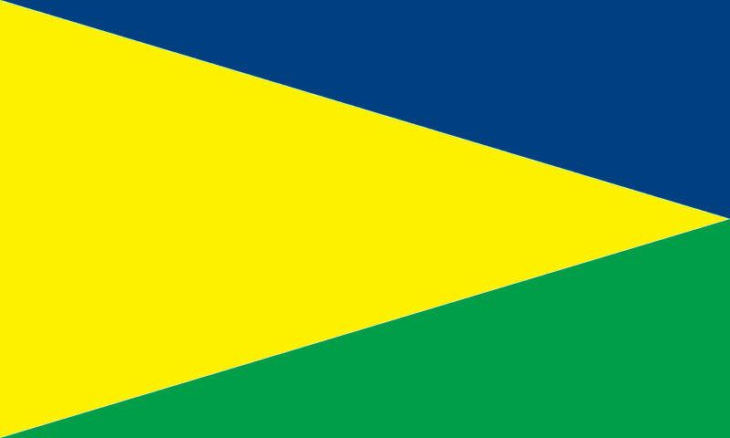 Bandera del Cantón Logroño